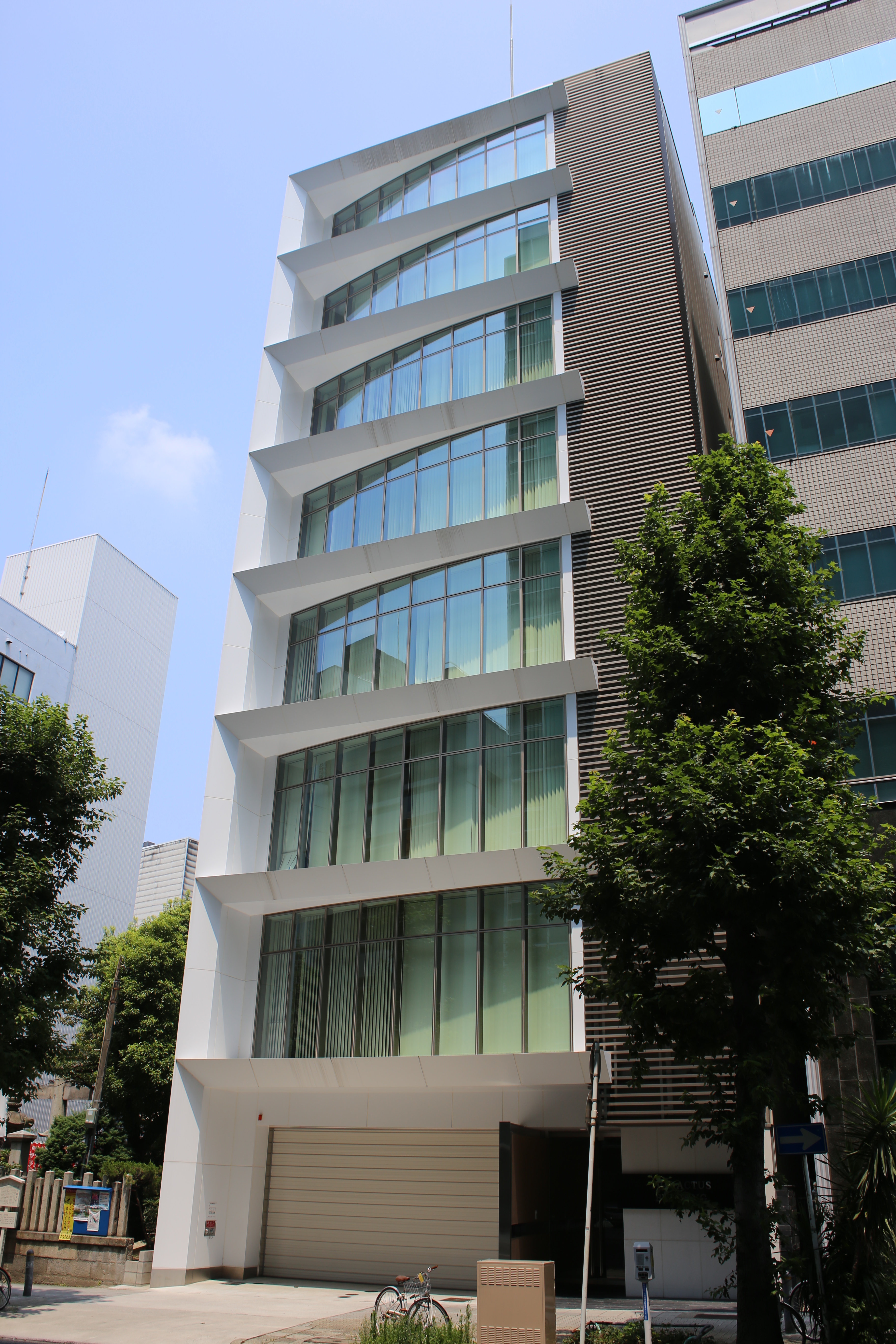 名古屋市中区錦一丁目のTIG・ACTUS BUILDING（山一本社ビル）を南側公道東側より撮影